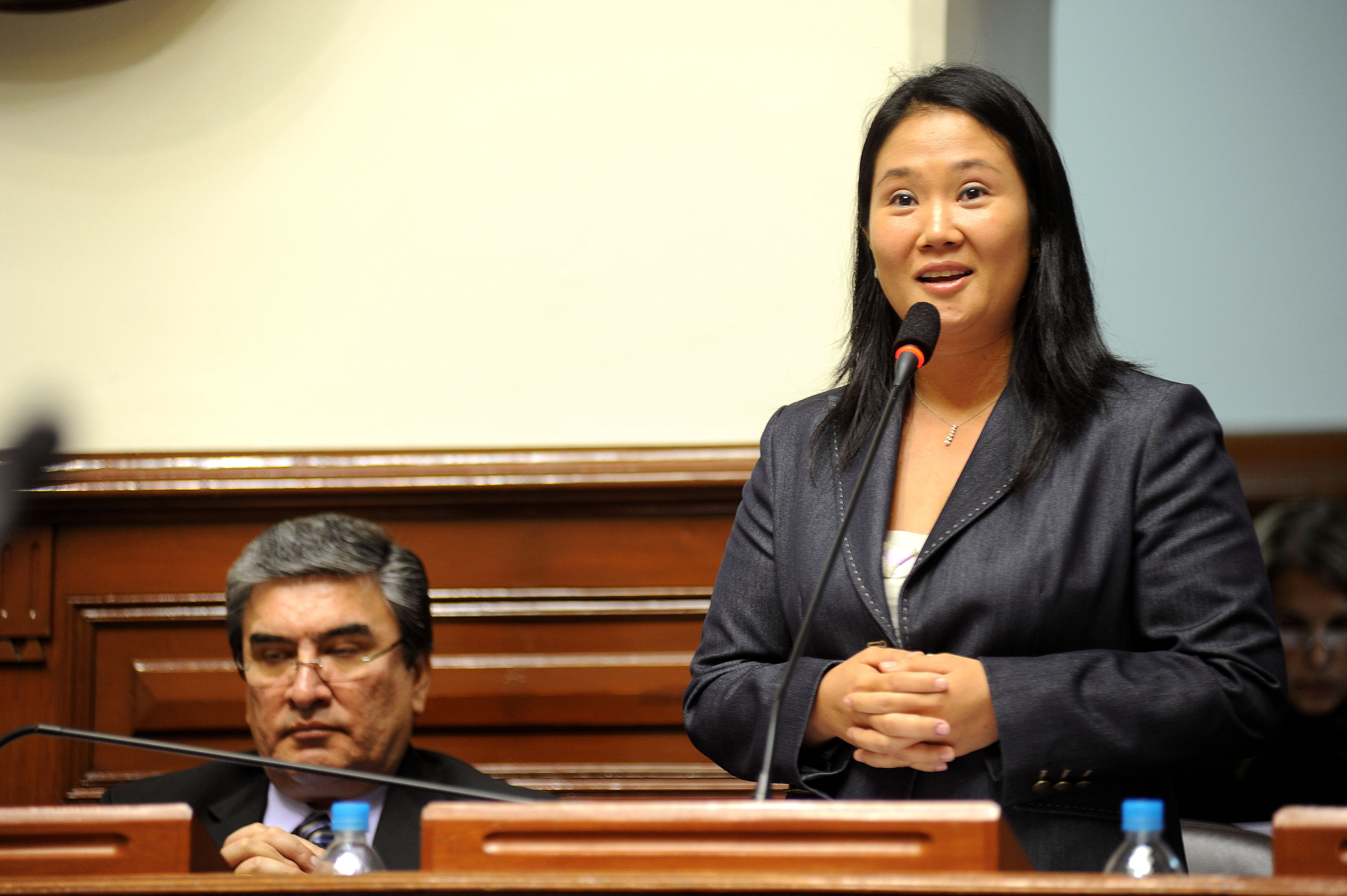 La legisladora Keiko Fujimori fija su posición en el debate parlamentario realizado esta tarde por el Pleno.